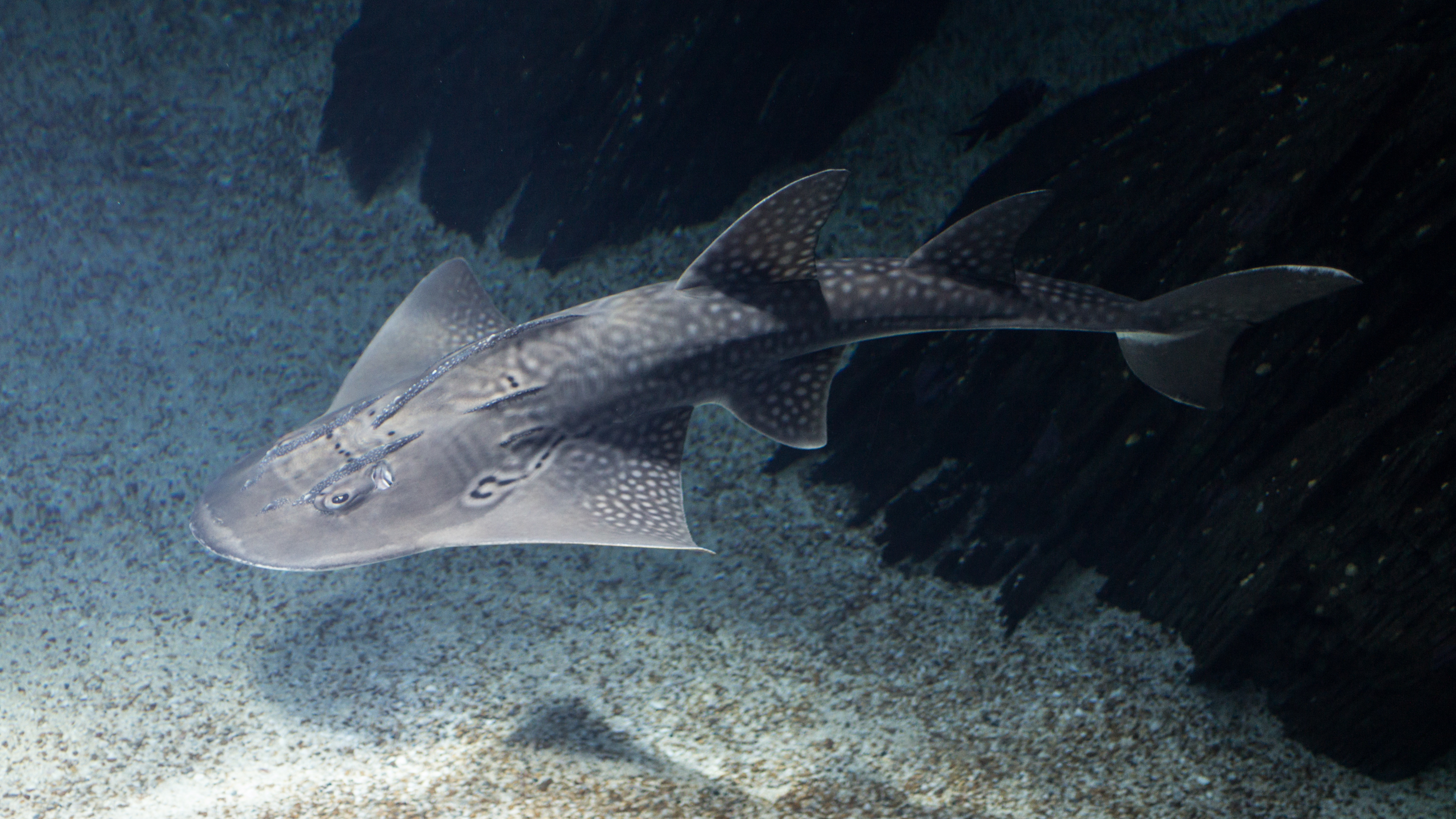 Lisboa Oceanário